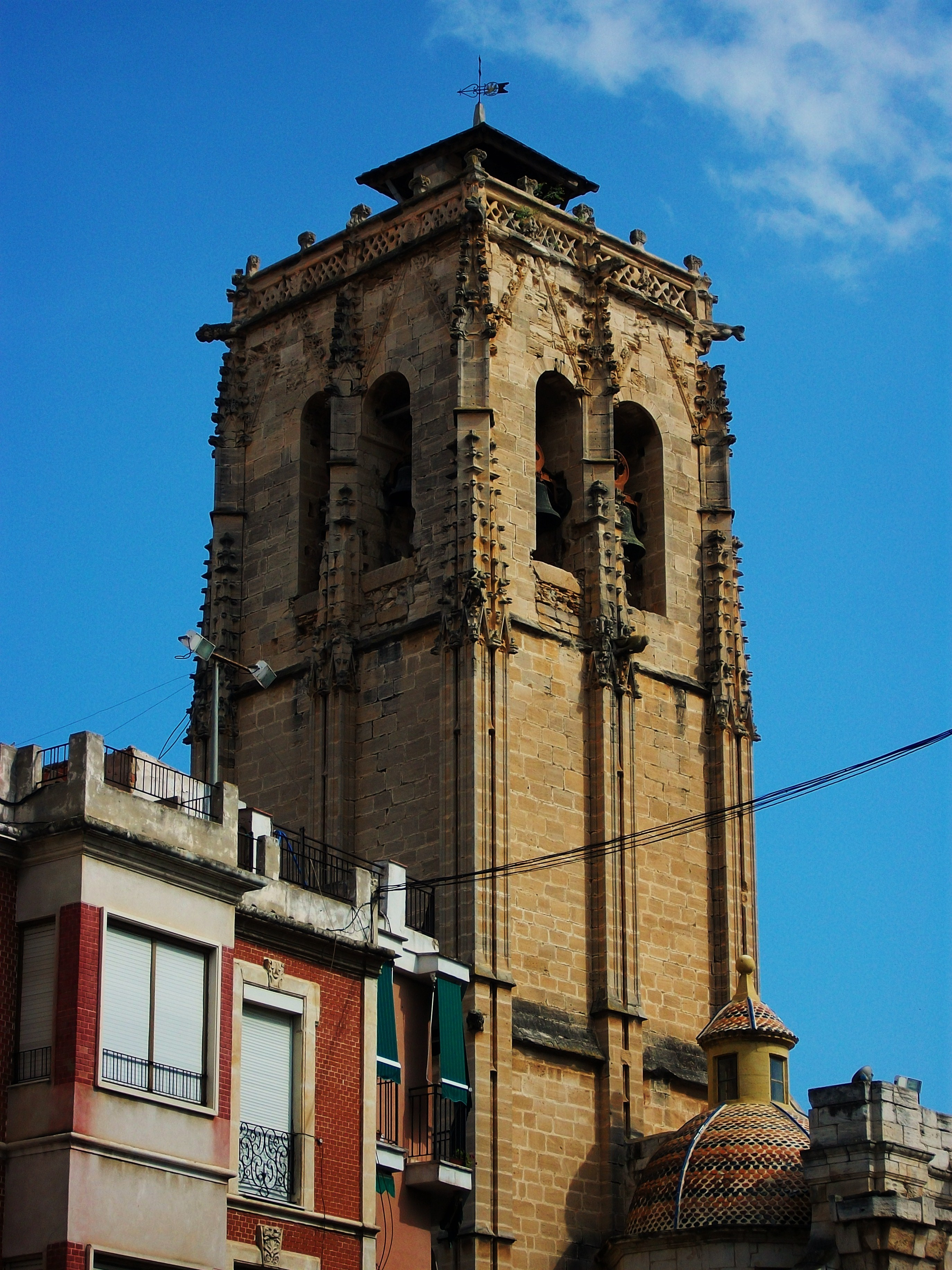 Campanar de l'església de les santes Justa i Rufina d'Oriola.